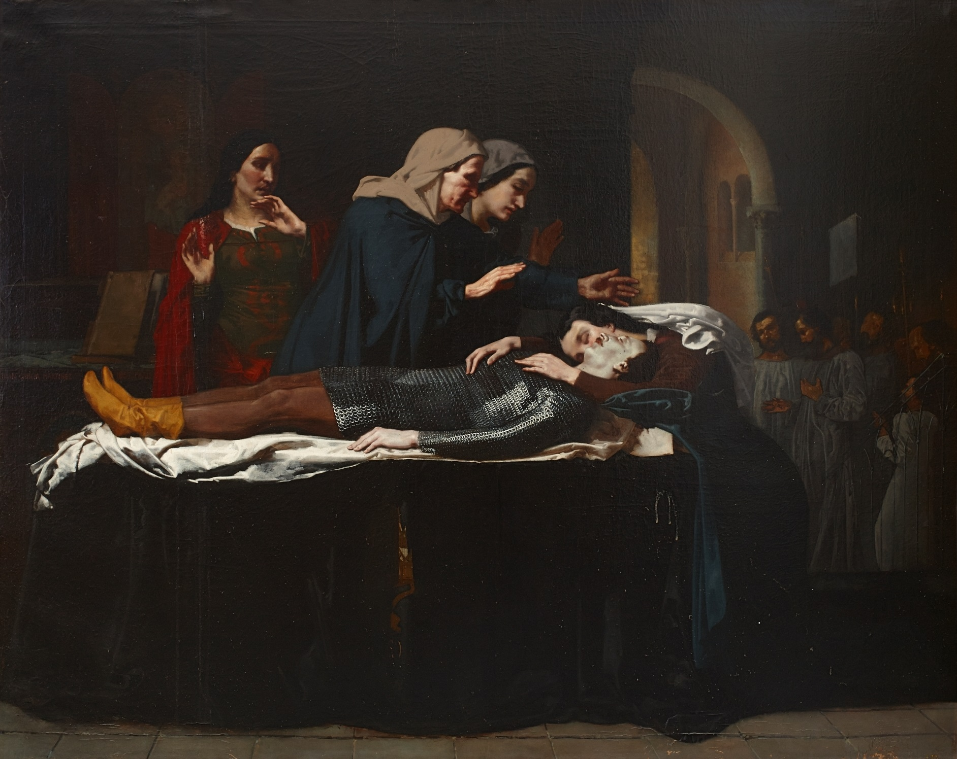 La obra representa la última escena de la obra Los amantes de Teruel, que fue escrita en 1837 por Juan Eugenio Hartzembusch.